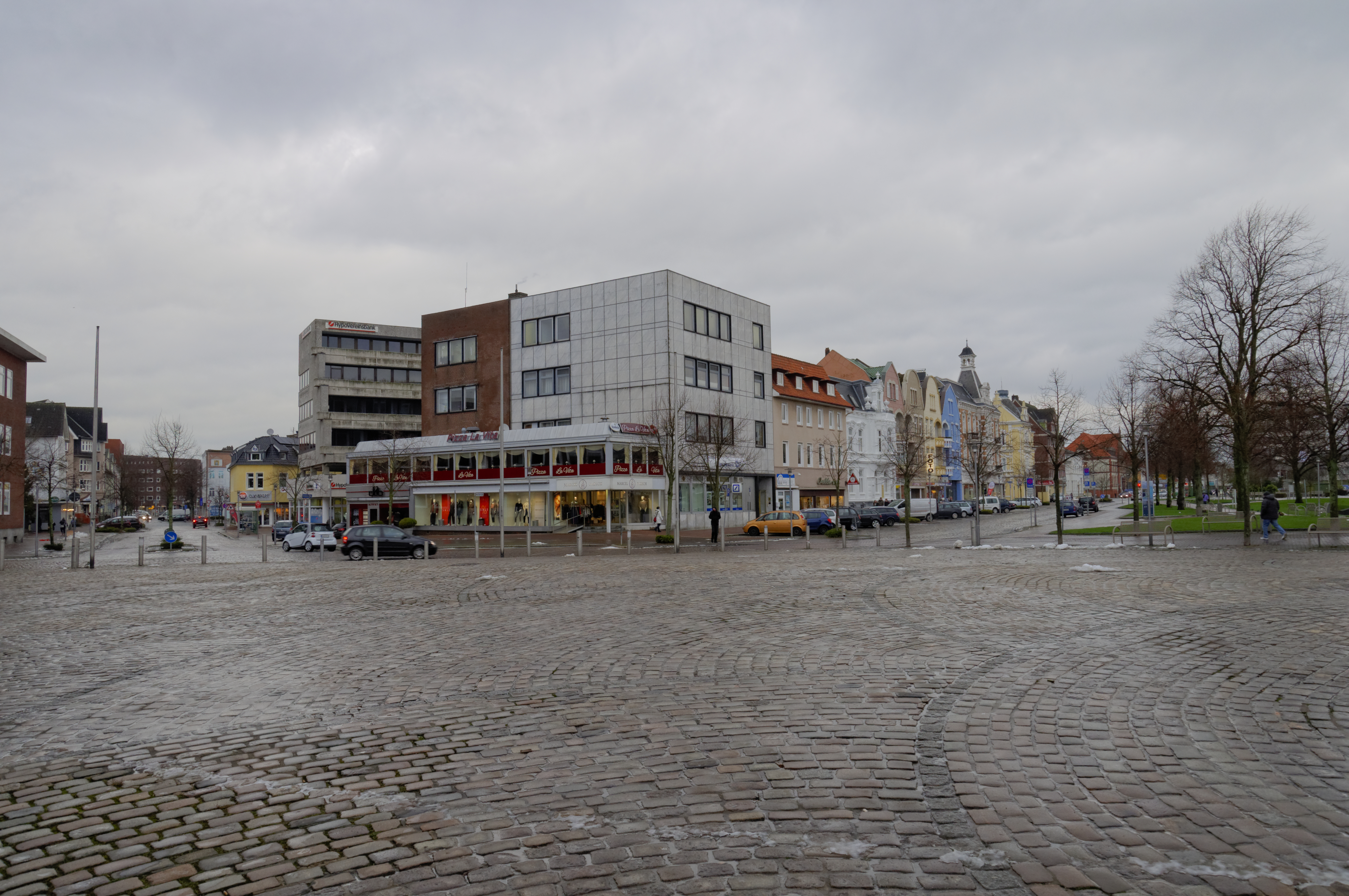 Bilder für die Organisation der AdminCon 2016